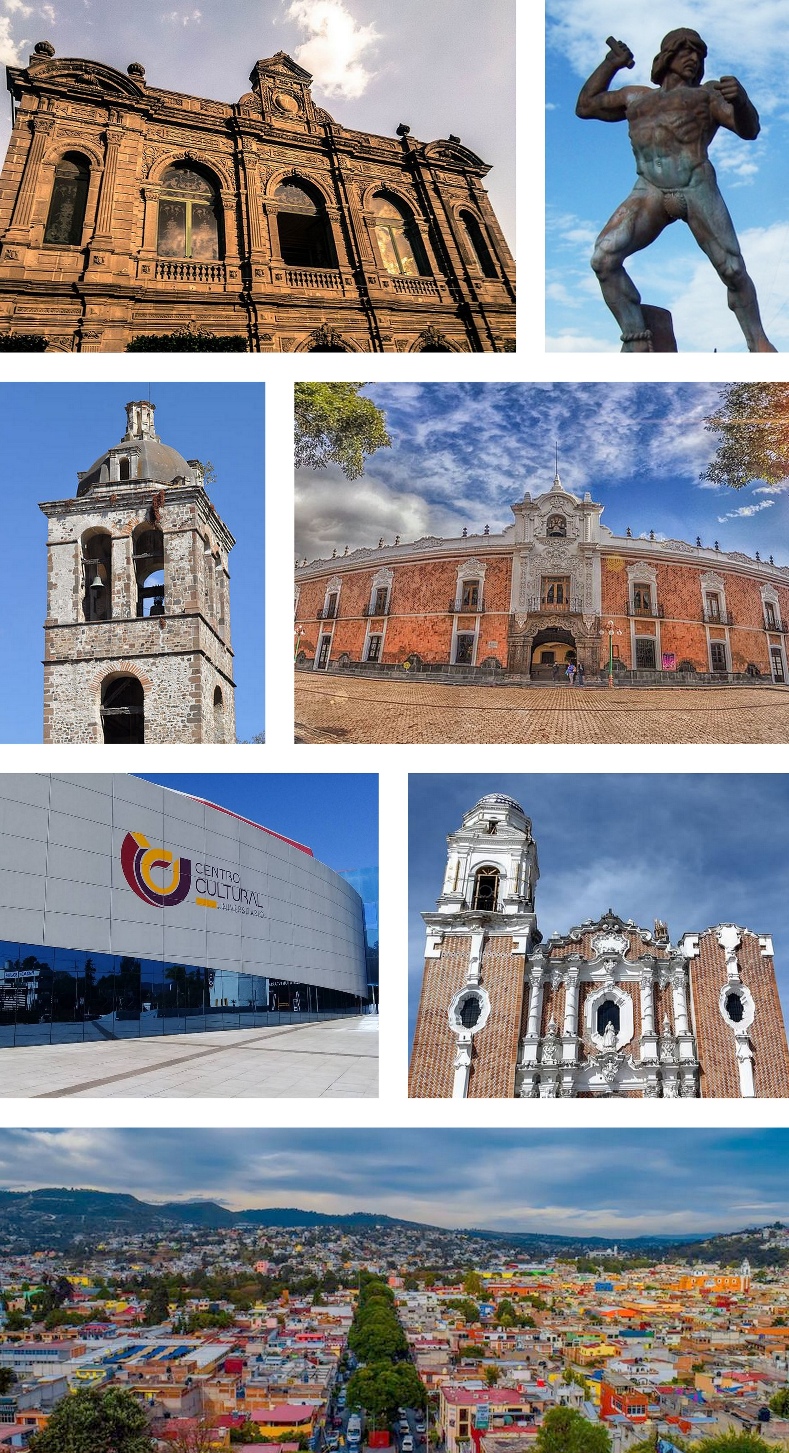 Montaje creado a partir de siete imágenes en Wikimedia Commons: File:Parroquia de San José (Tlaxcala).jpg File:CCU Tlaxcala.jpg File:Vista de Tlaxcala.jpg File:Monumento a Tlahuicole.jpg File:Campanario desde capilla abierta.JPG File:Palacio de Gobierno - panoramio (13).jpg File:Centro, Tlaxcala de Xicohténcatl, Tlax., Mexico - panoramio (301).jpg